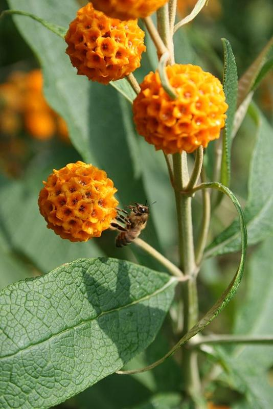 Buddleja globosa, ex hortus